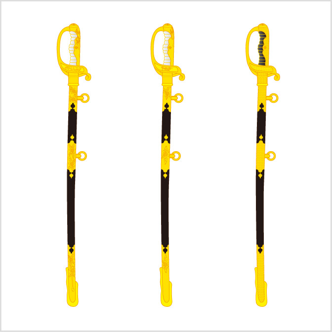 臺灣總督府文官的長劍。Redraw Government-General of Taiwan Gazette.